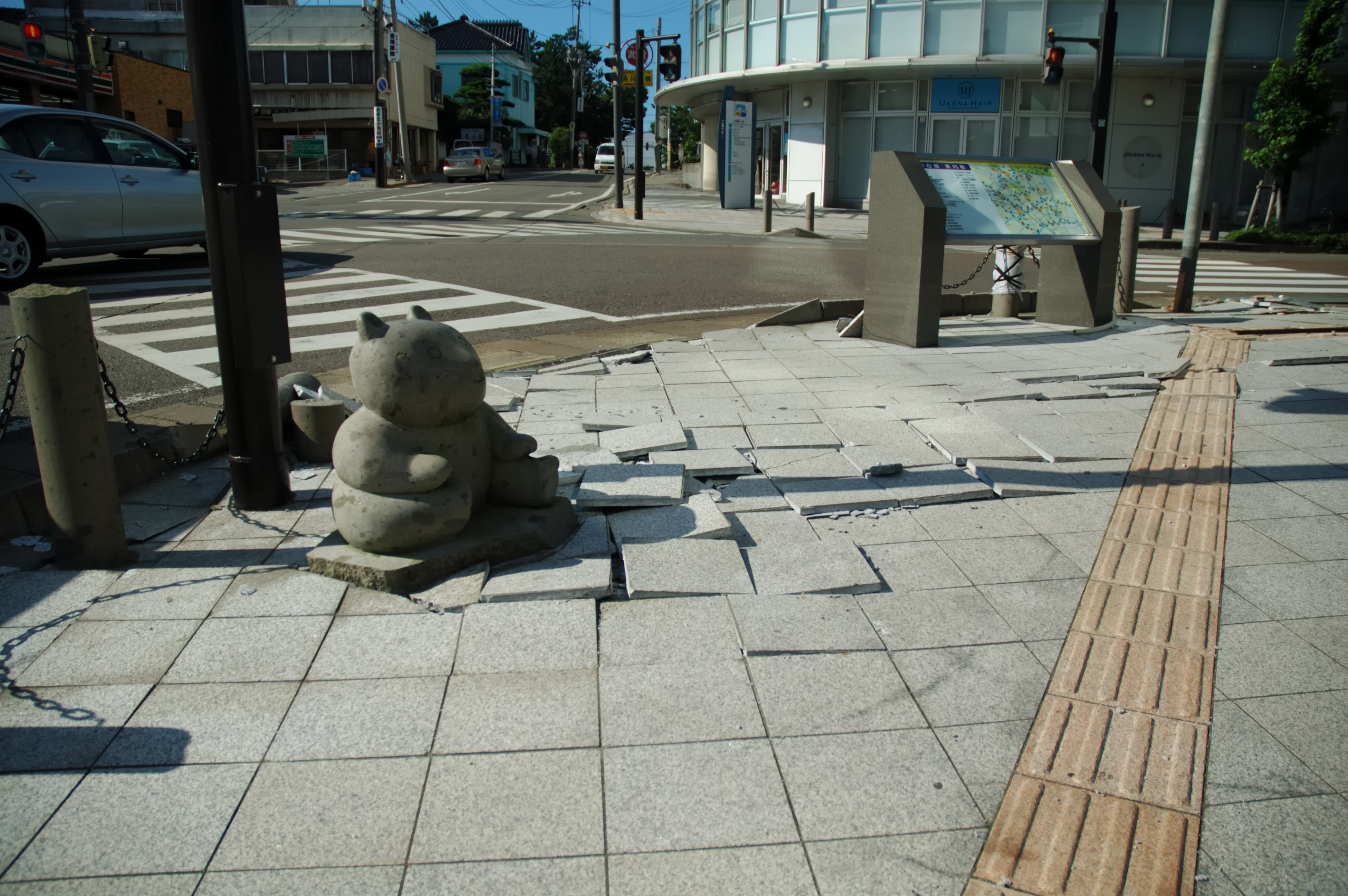 Sidewalk of Higashi-honcho, Kashiwazaki City (柏崎市東本町の歩道)